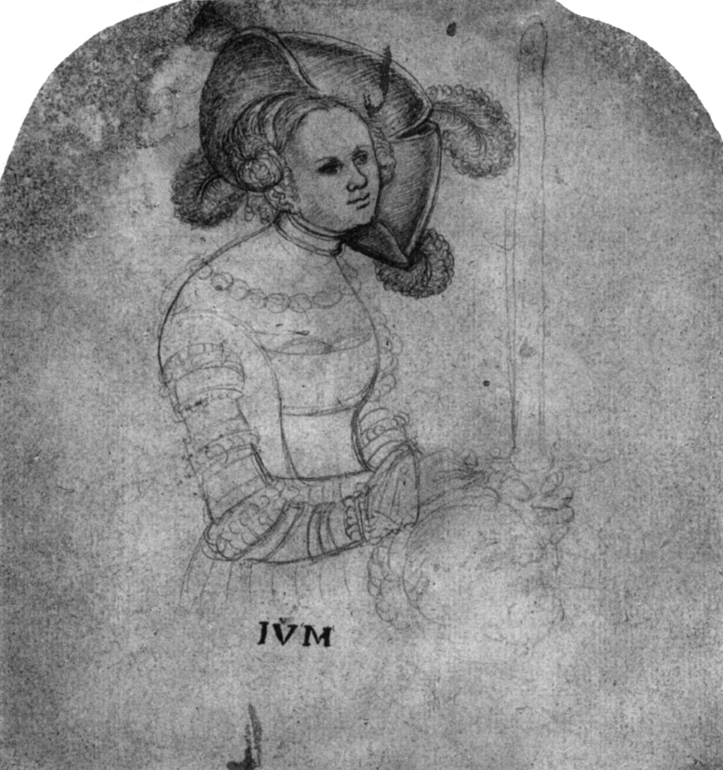 Halbfigur der Judith, Lucas Cranach d.Ä. (zugeschrieben), Silberstiftzeichnung, ehemals Dessau, Kriegsverlust des Zweiten Weltkriegs